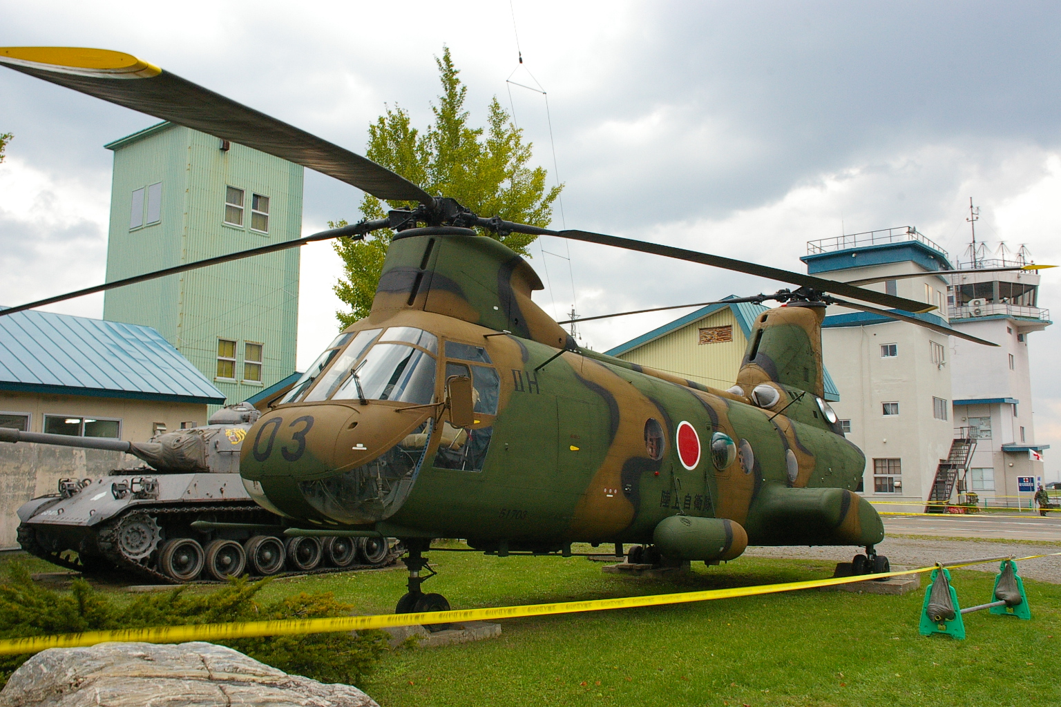 JGSDF Retired KV-107IIA-4 in Okadma STA.